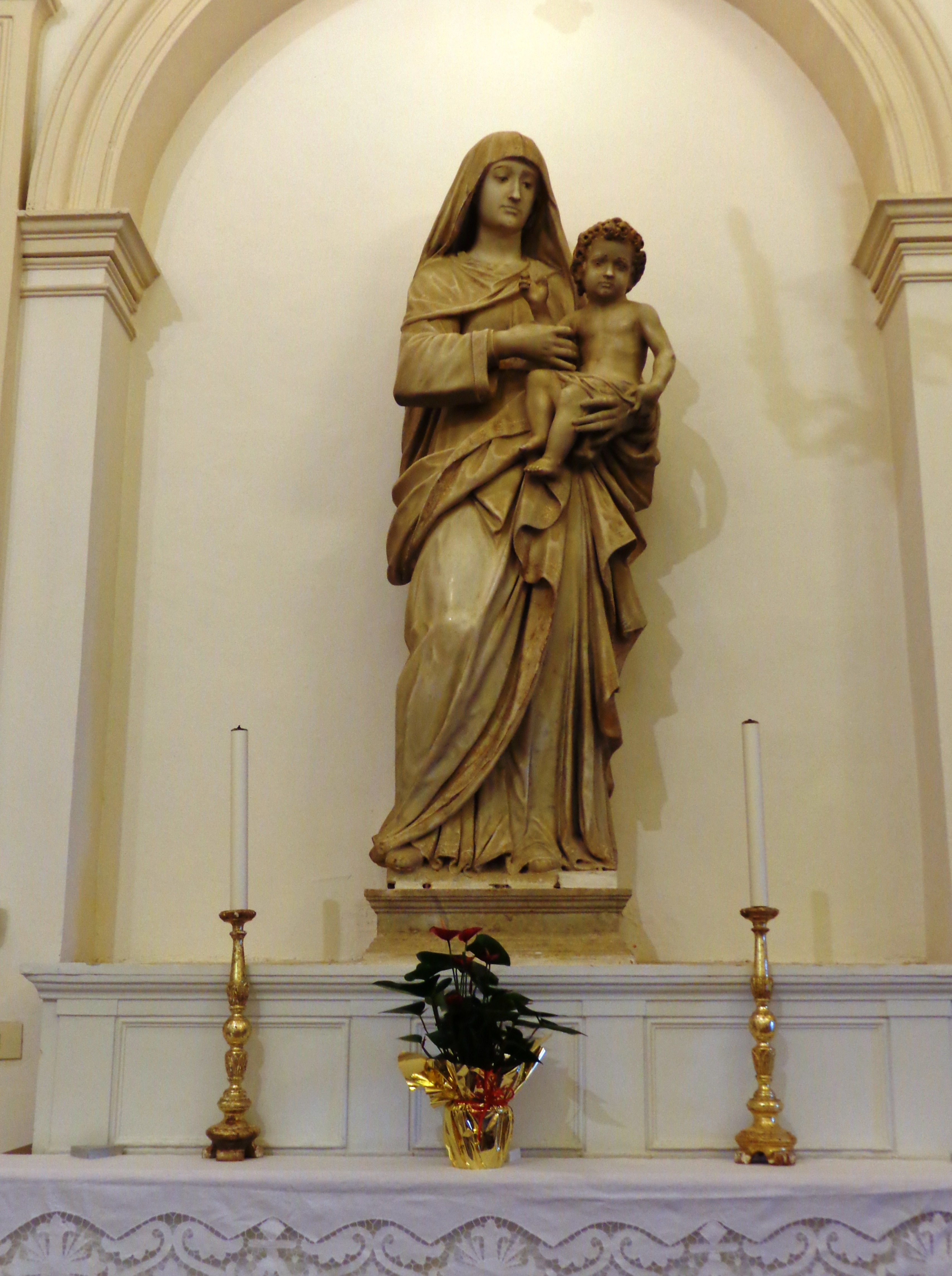 S.Agata_Castroreale_04